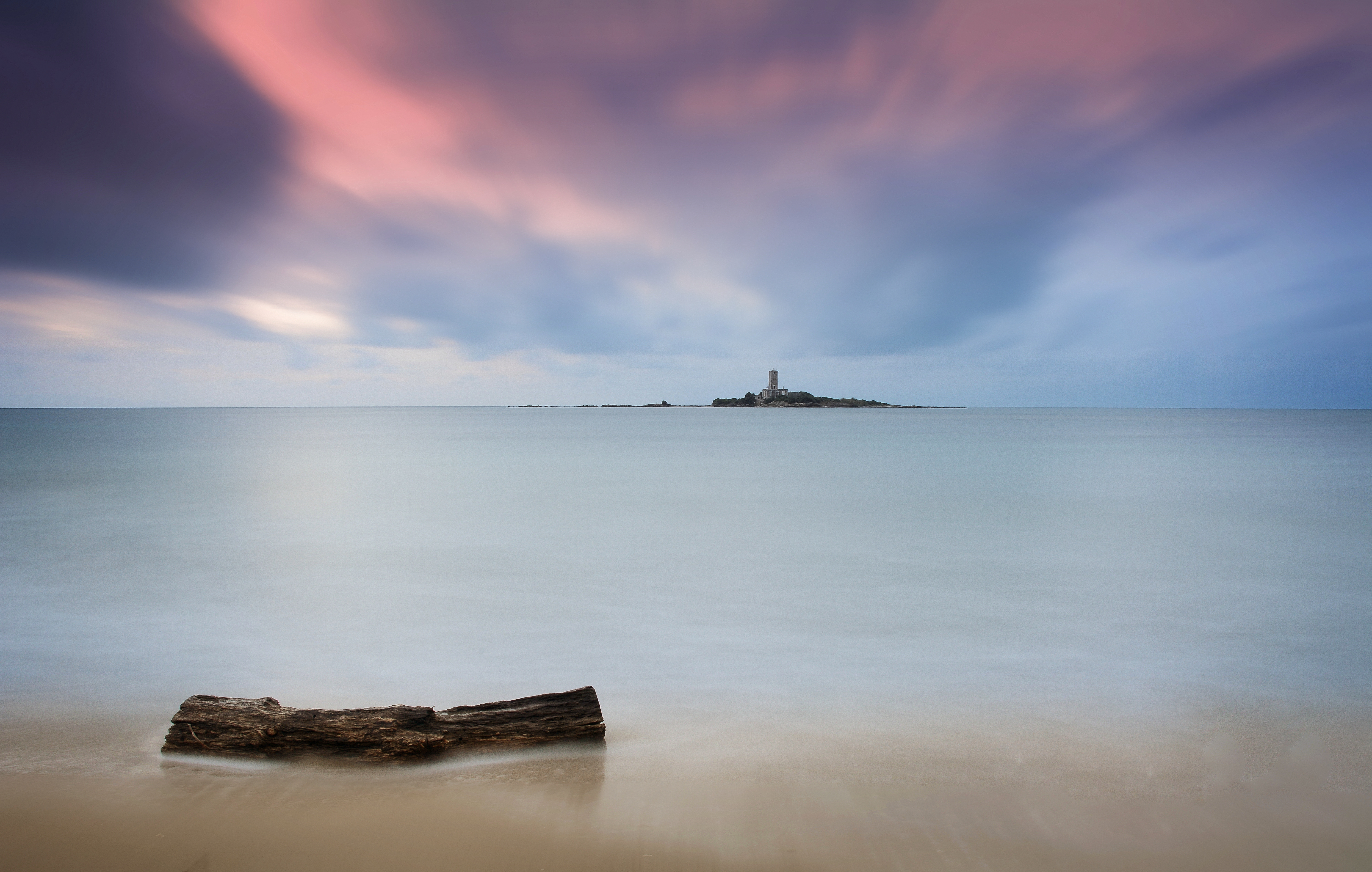 Κάστρο Χλεμούτσι«Κάστρο Χλεμούτσι»